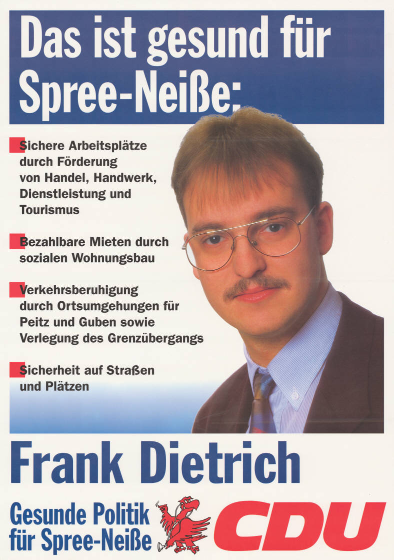 Das ist gesund für Spree-Neiße: . Sichere Arbeitsplätze durch Förderung von Handel, Handwerk, Dienstleistung und Tourismus . Bezahlbare Mieten durch sozialen Wohnungsbau . Verkerhsberuhigung durch Ortsumgehungen für Peitz und Guben sowie Verlegung des Grenzübergangs . Sicherheit auf Straßen und Plätzen Frank Dietrich Gesunde Politik für Spree-Neiße CDU Abbildung: Porträtfoto Plakatart: Kandidaten-/Personenplakat mit Porträt Objekt-Signatur: 10-033 : 238 Bestand: Landtagswahlplakate Brandenburg (10-033) GliederungBestand10-18: Landtagswahlplakate Brandenburg (10-033) » CDU Lizenz: KAS/ACDP 10-033 : 238 CC-BY-SA 3.0 DE